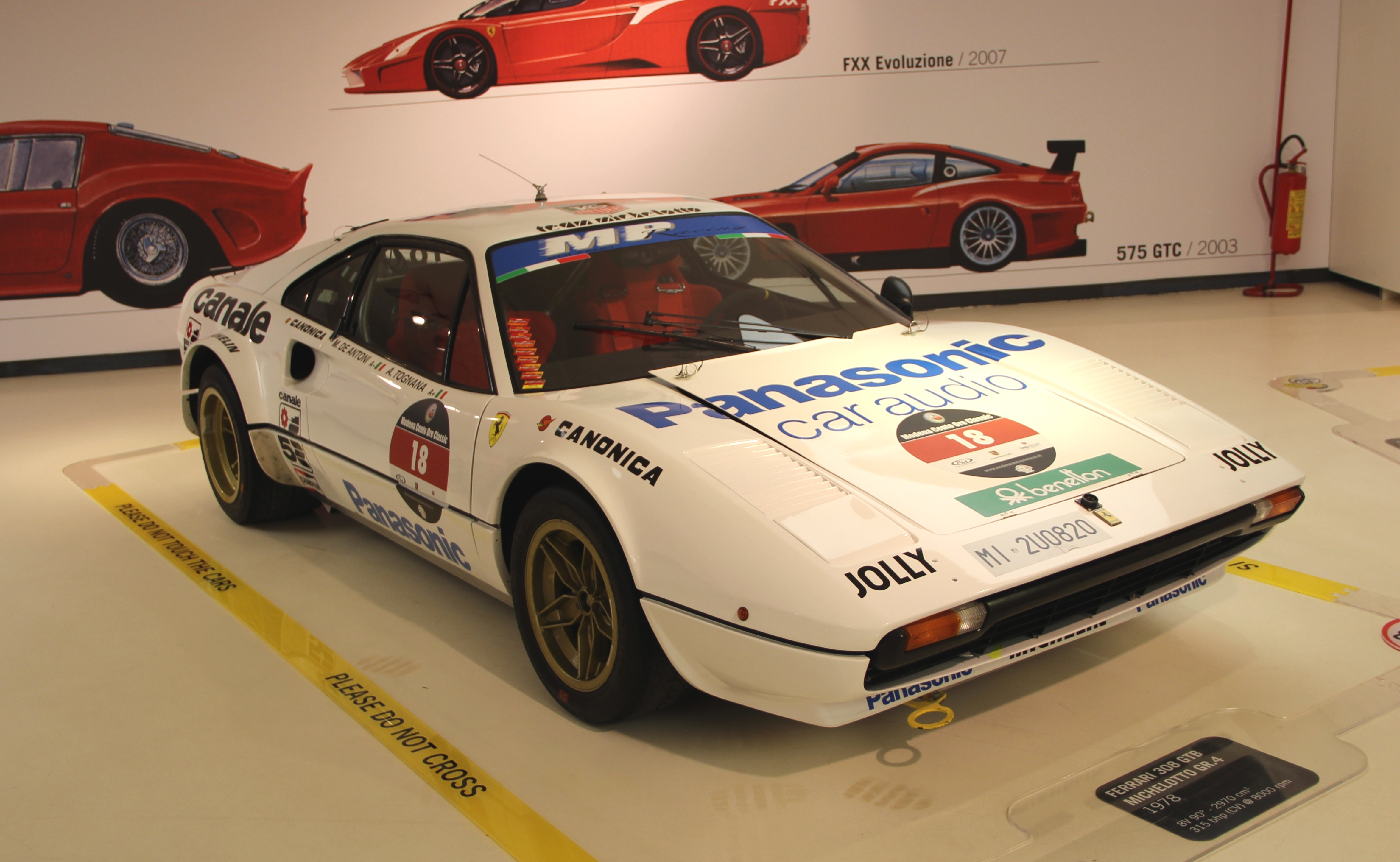 Ferrari-Museum Maranello